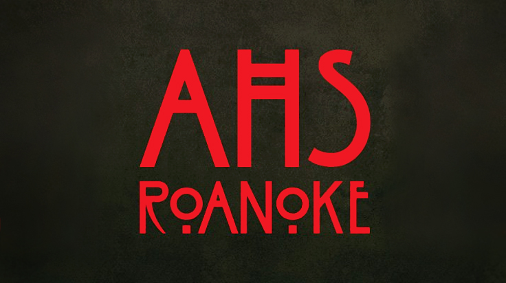 Logo oficial de American Horror Story: Roanoke.